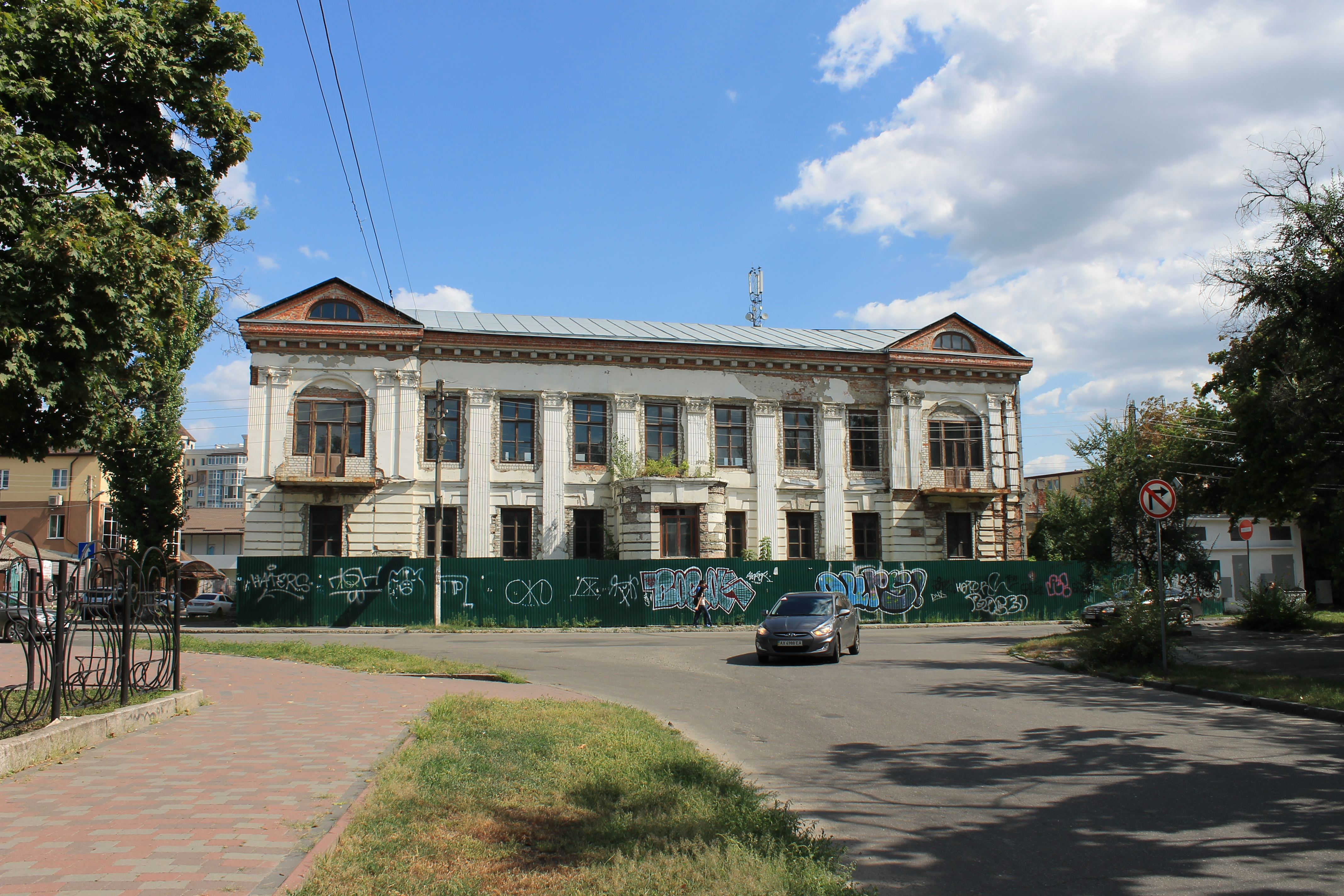 Пам'ятка архітектури 19ст. (охор.№359) колишня поштово-телеграфна контора, архітектор Шевцов С., сучасна адреса: пл. Фейєрбаха, 15, м.Харків.